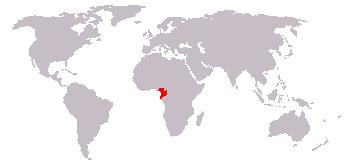 Bewerking afbeelding: afbeelding_(kaart).jpg